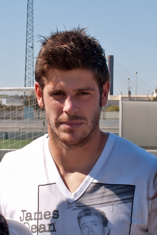 Fabricio Agosto, ciudad deportiva del Real Betis, octubre de 2011.